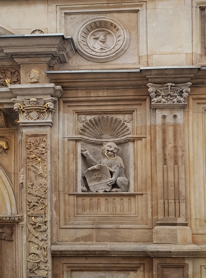 Pałac Schlegenbergów we Wrocławiu, detal